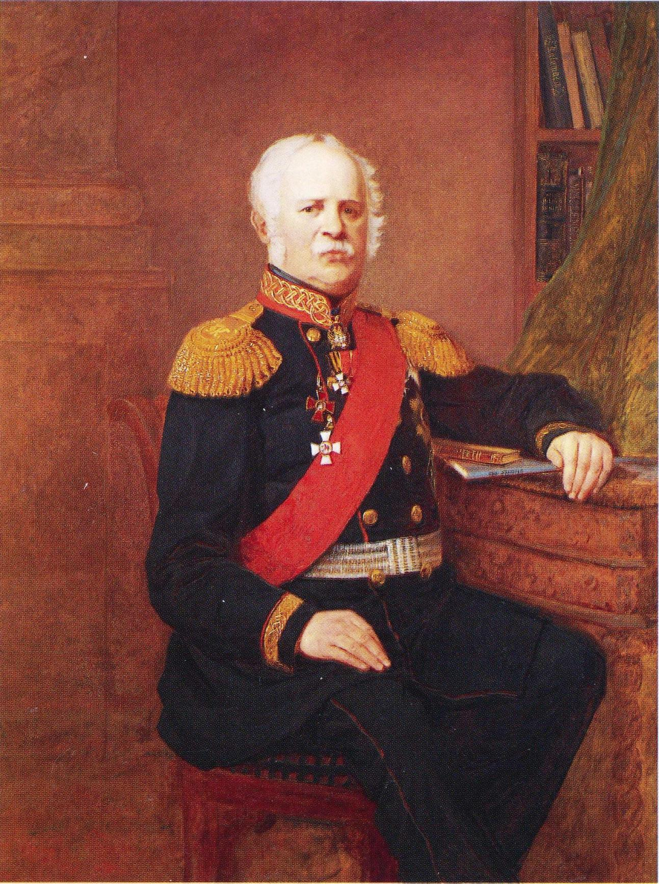 Jalkaväenkenraali ja yliopiston sijaiskansleri Johan Reinhold Munck (1795–1865) postuumissa muotokuvassa. Pöydällä lojuvat kirjat Fänrik Ståls Sägner (Vänrikki Stoolin tarinat) ja Univ. Statuter (Yliopiston statuutit). Muotokuva kuuluu Helsingin yliopiston kokoelmiin.